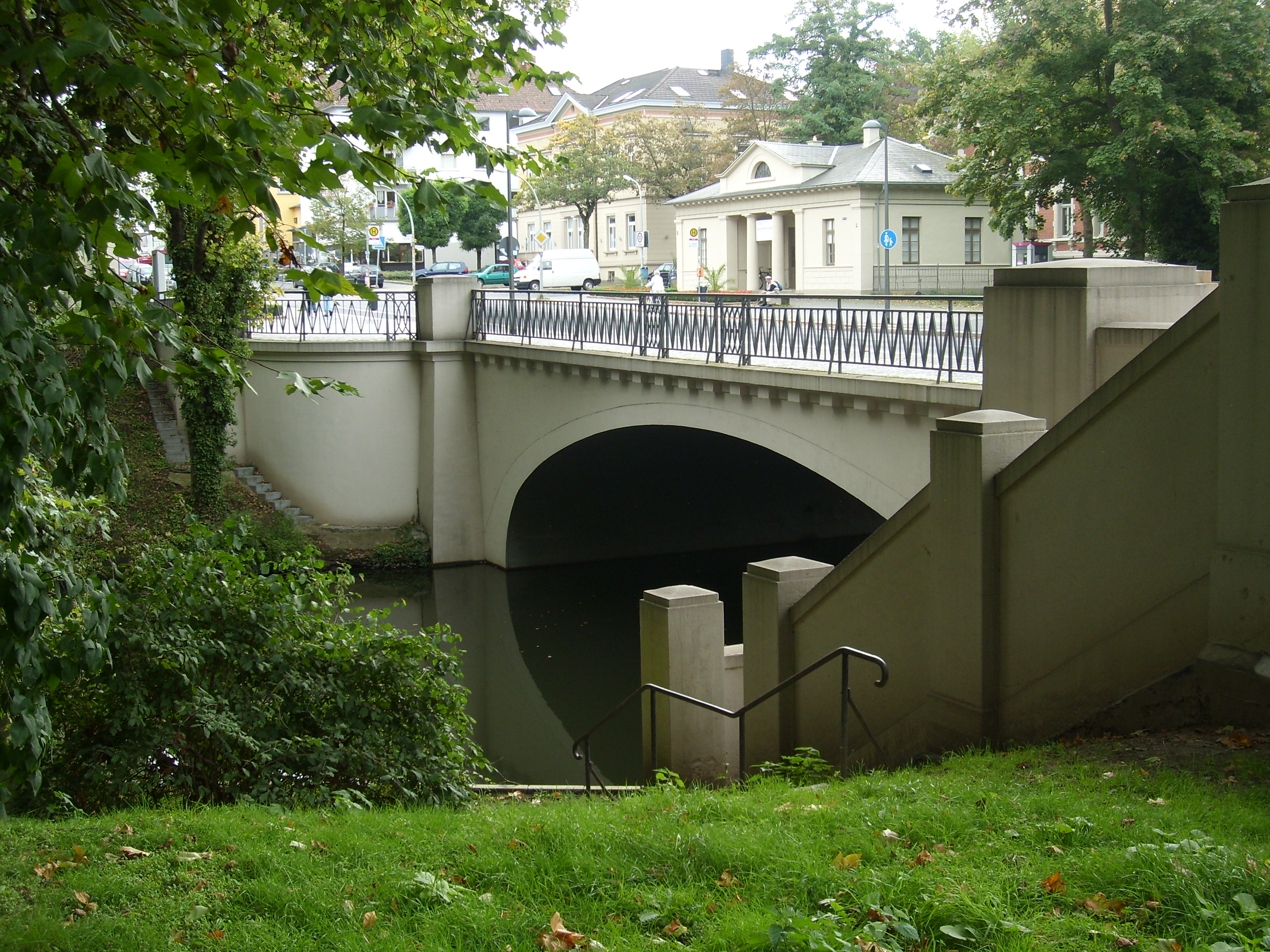 Brücke über den östlichen Umflutgraben, Museumsstraße